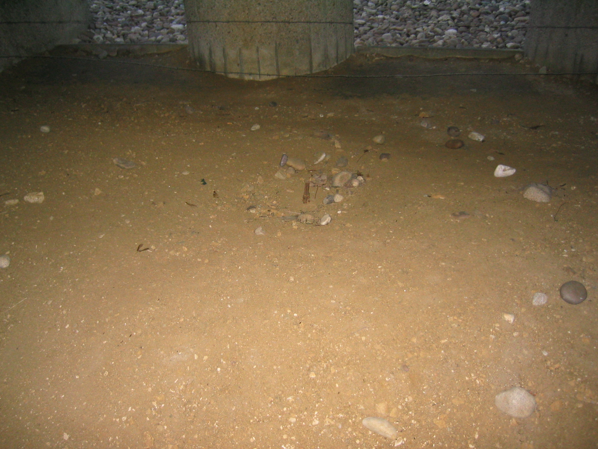 Tranchée des Baïonnettes - Extrémité du canon du fusil